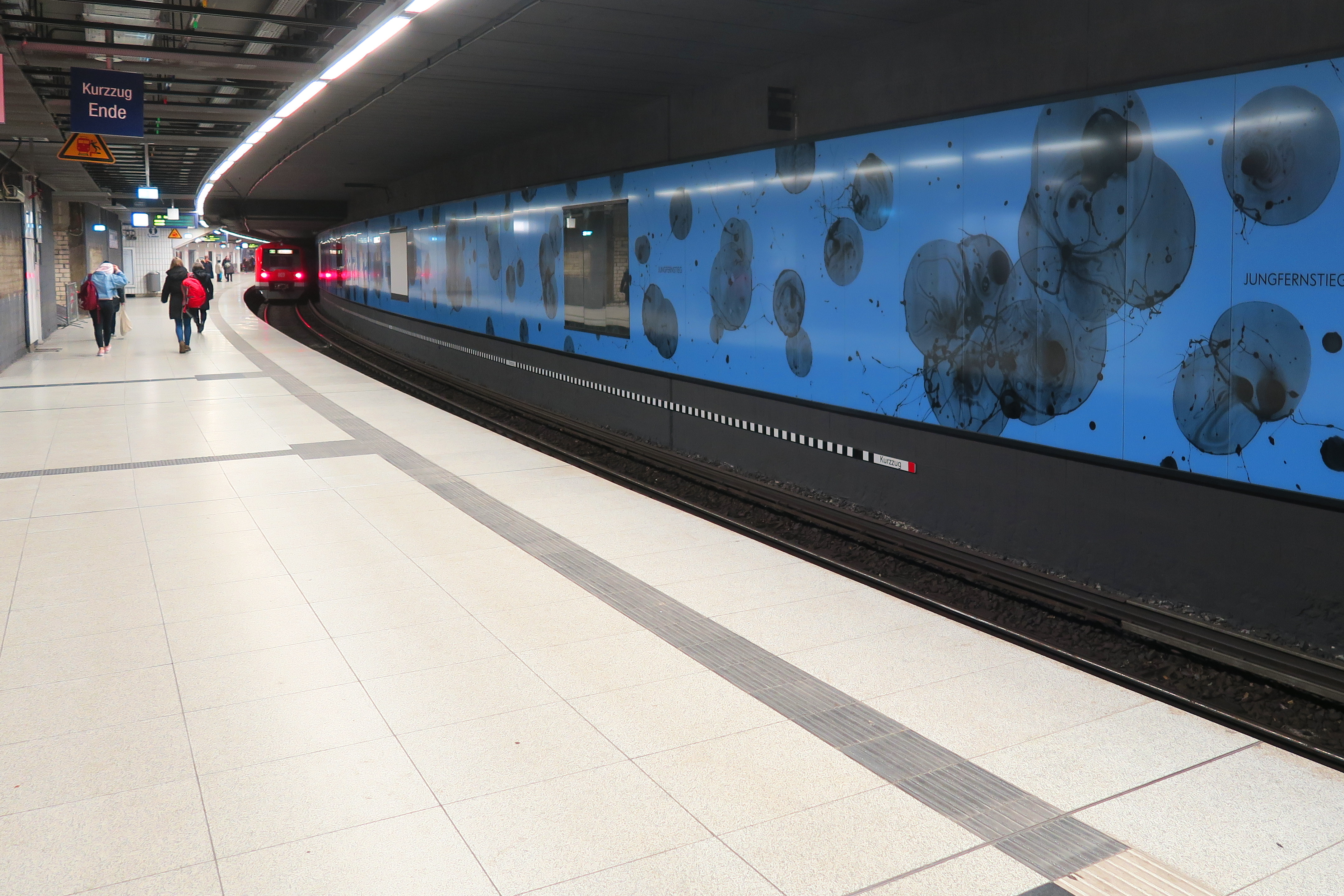 S-Bahnhof Jungfernstieg, März 2018